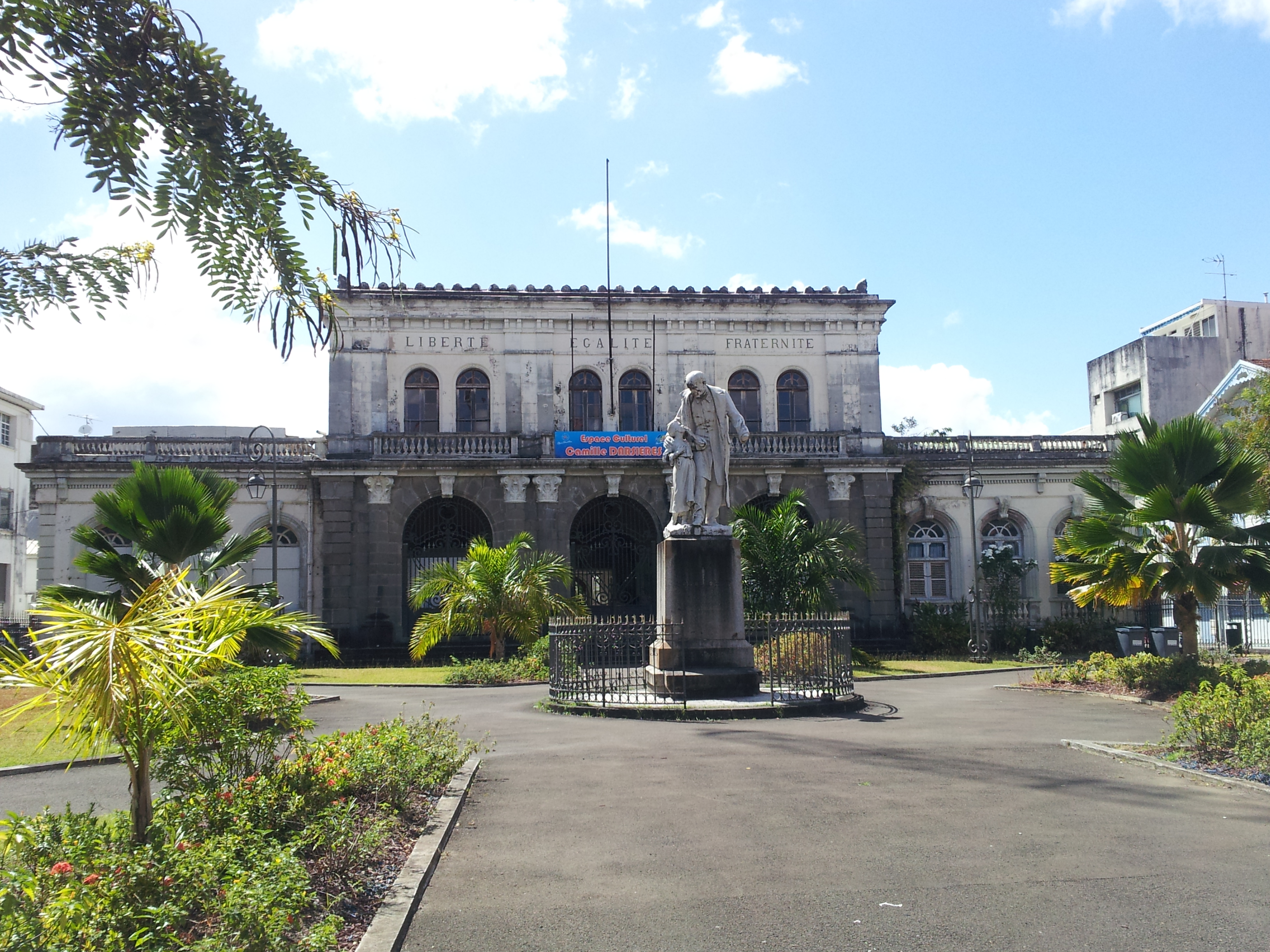 Ancien palais de justice de Fort-de-France et statue de Schoelcher.